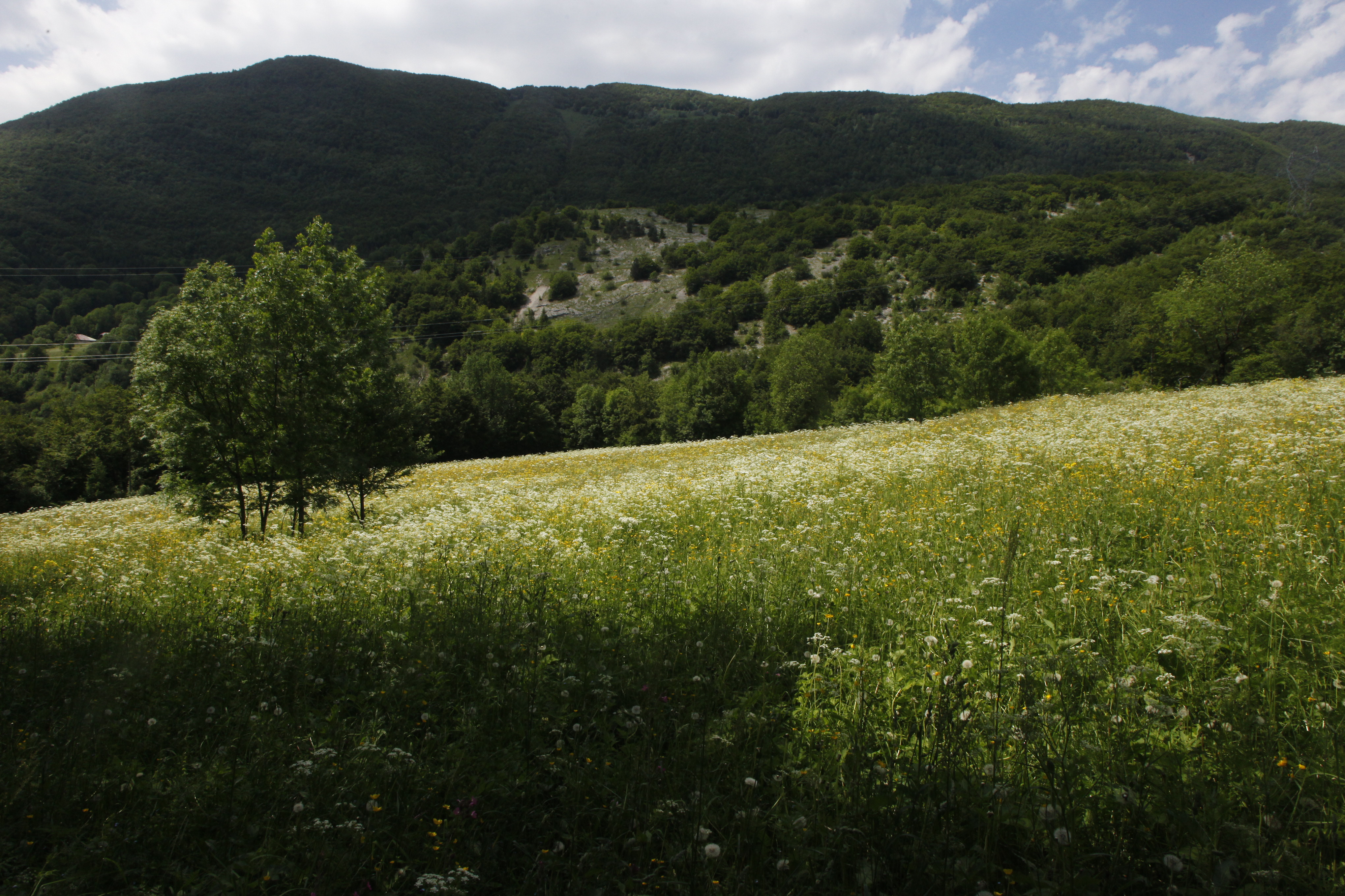 Une prairie en fleur au mois de juin dans la vallée de la Valserine.